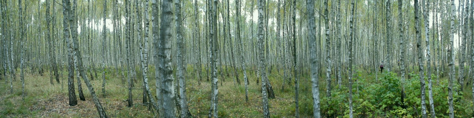 Березове полісся